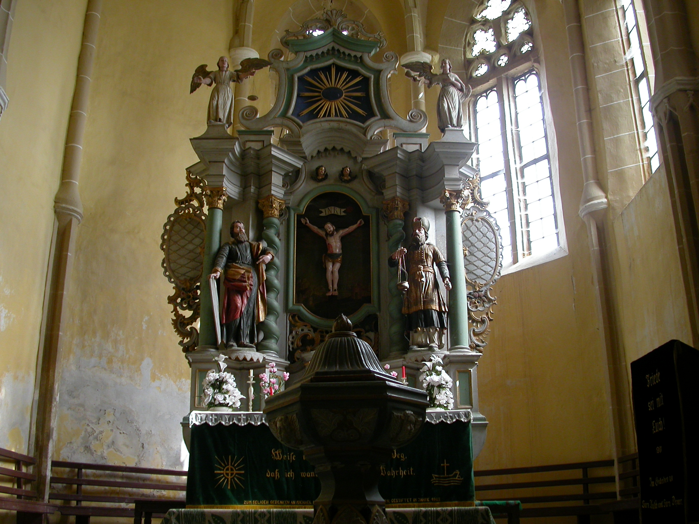 Ansamblul bisericii evanghelice fortificate, sec. XIV - XVIII